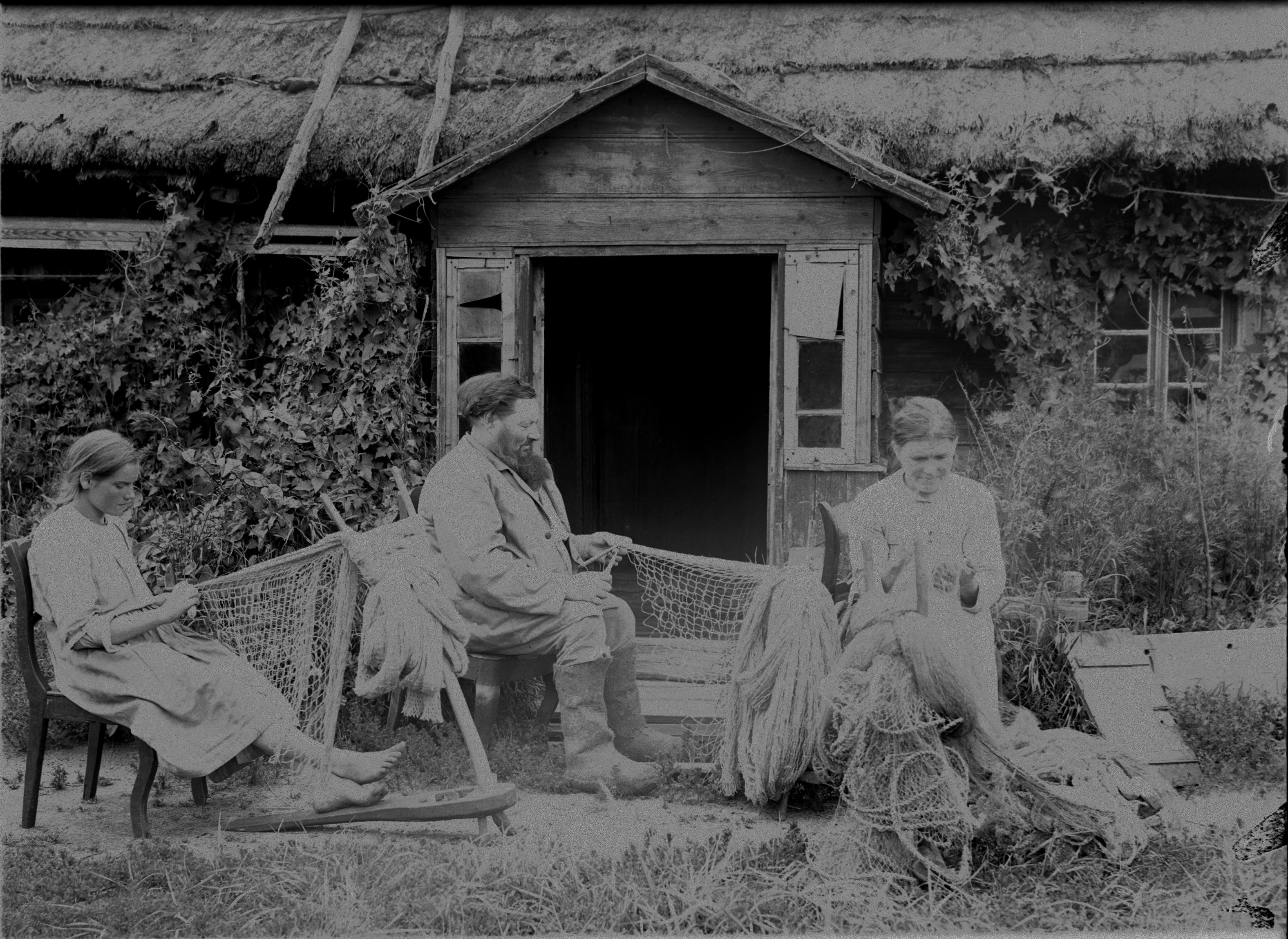 Nooda kudumine Koipsi saarel